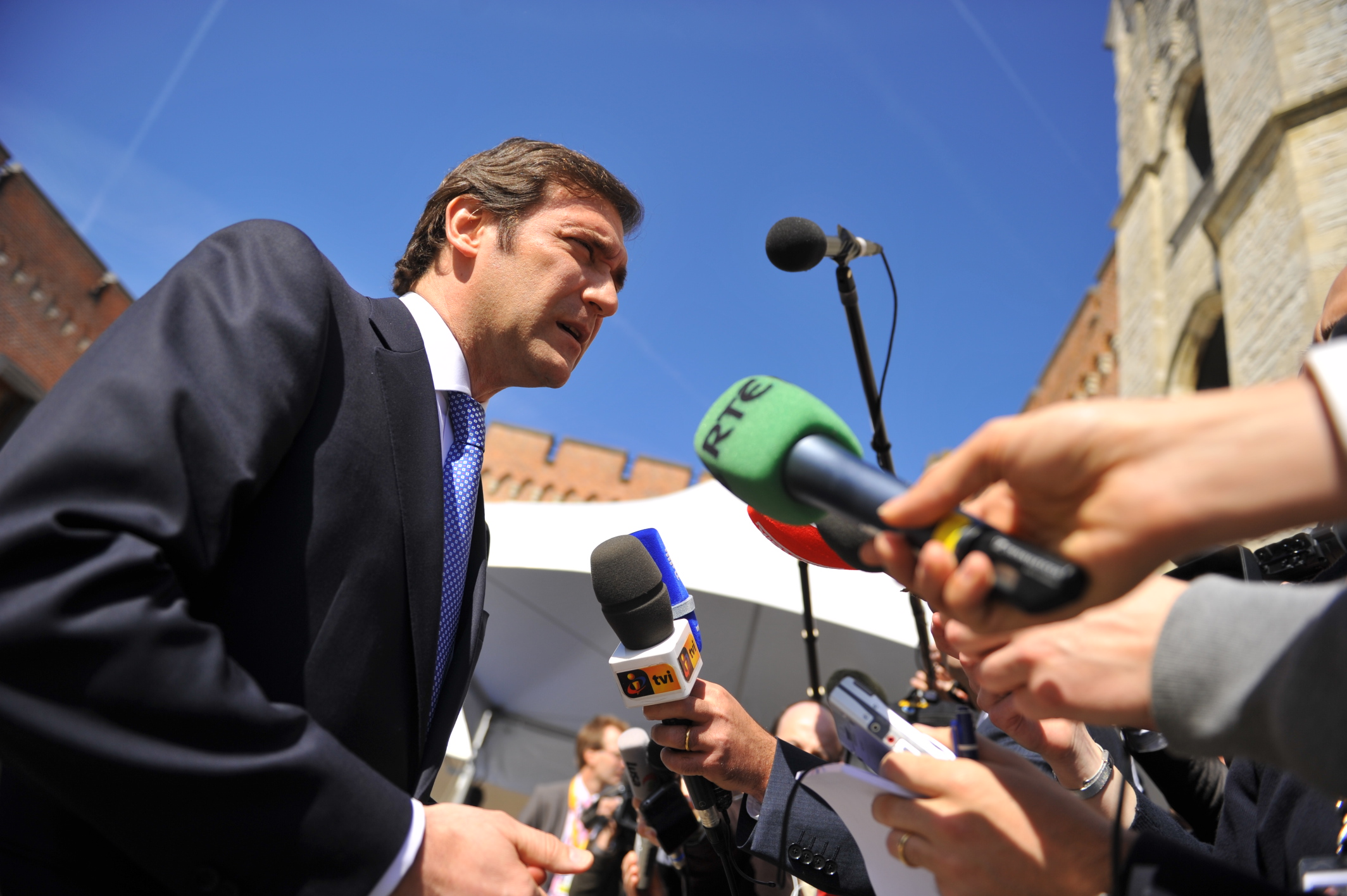 Pedro Passos Coelho